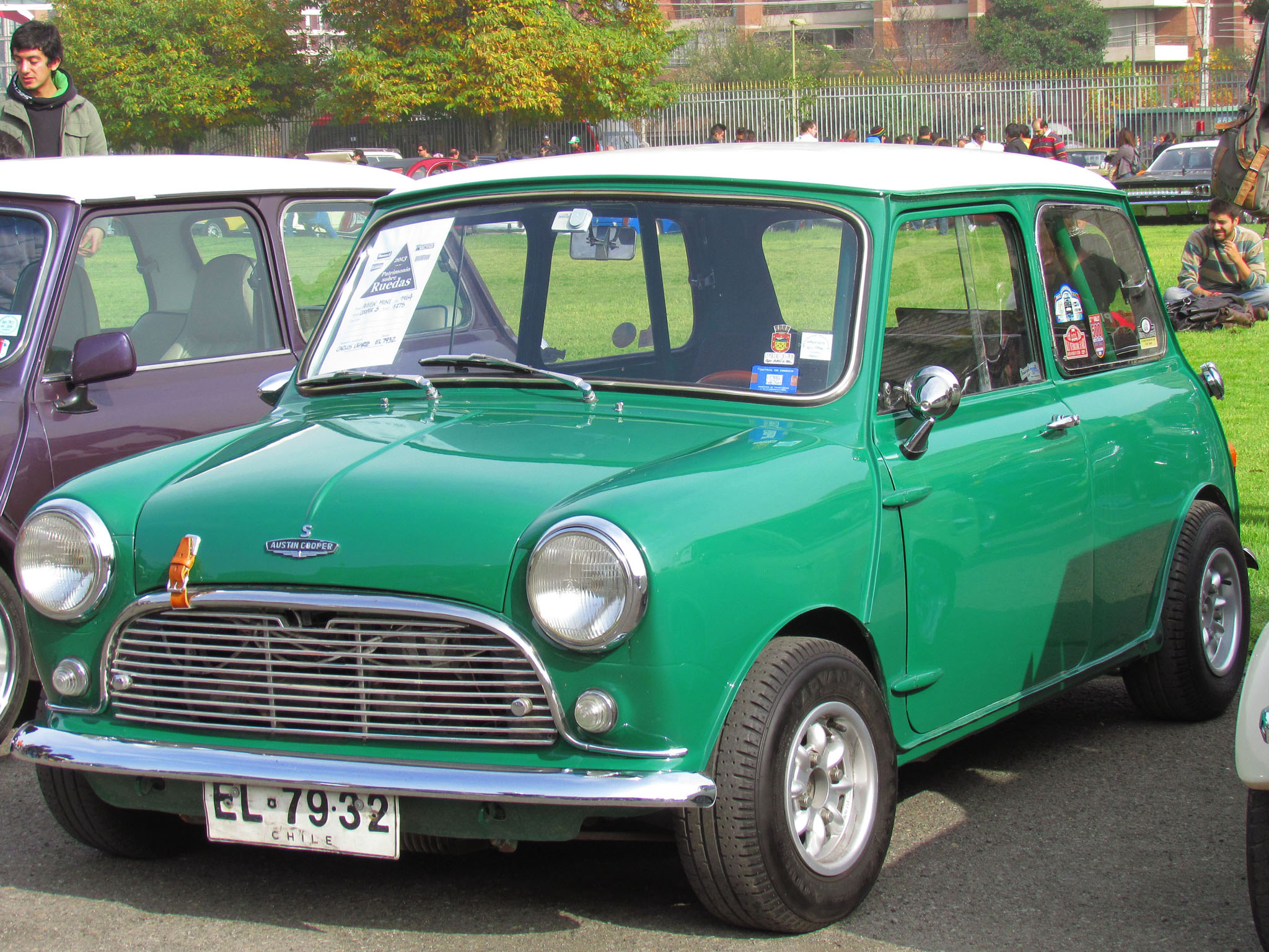 Patrimonio sobre ruedas 2013, Santiago, Chile